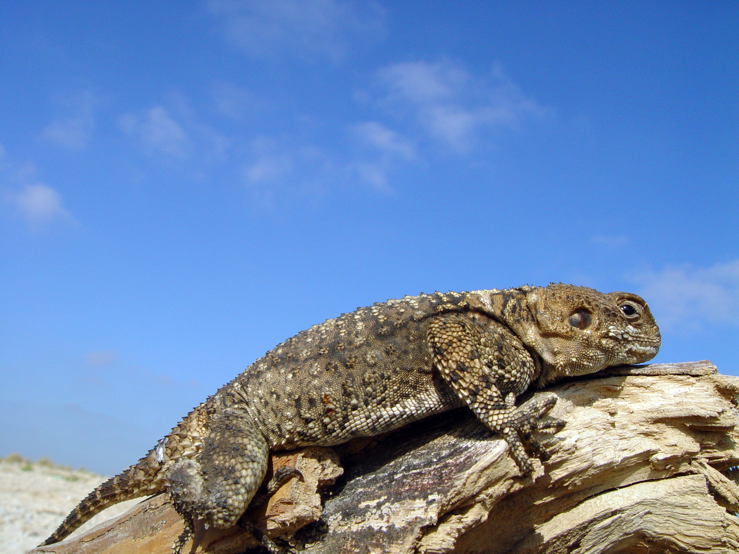 חרדון מצוי על גזע עץ. צילום --גיא חיימוביץ 05:15, 11 מרץ 2006 (UTC)